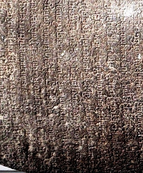 Penggalan prasasti Anjukladang (957 M) menunjukkan gaya penulisan aksara Kawi (Jawa Kuna) periode Akhir (Medang timur).